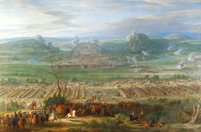 Le siège de Besançon 1674 - Peintre attitré de Louis XIV - école Flamande (1674) - Louis XIV reprend la Franche-Comté et Besançon par la guerre à Charles II de Habsbourg d'Espagne après 201 ans de règne Habsbourg. Il l'associe définitivement à la France par le traité de Nimègue.